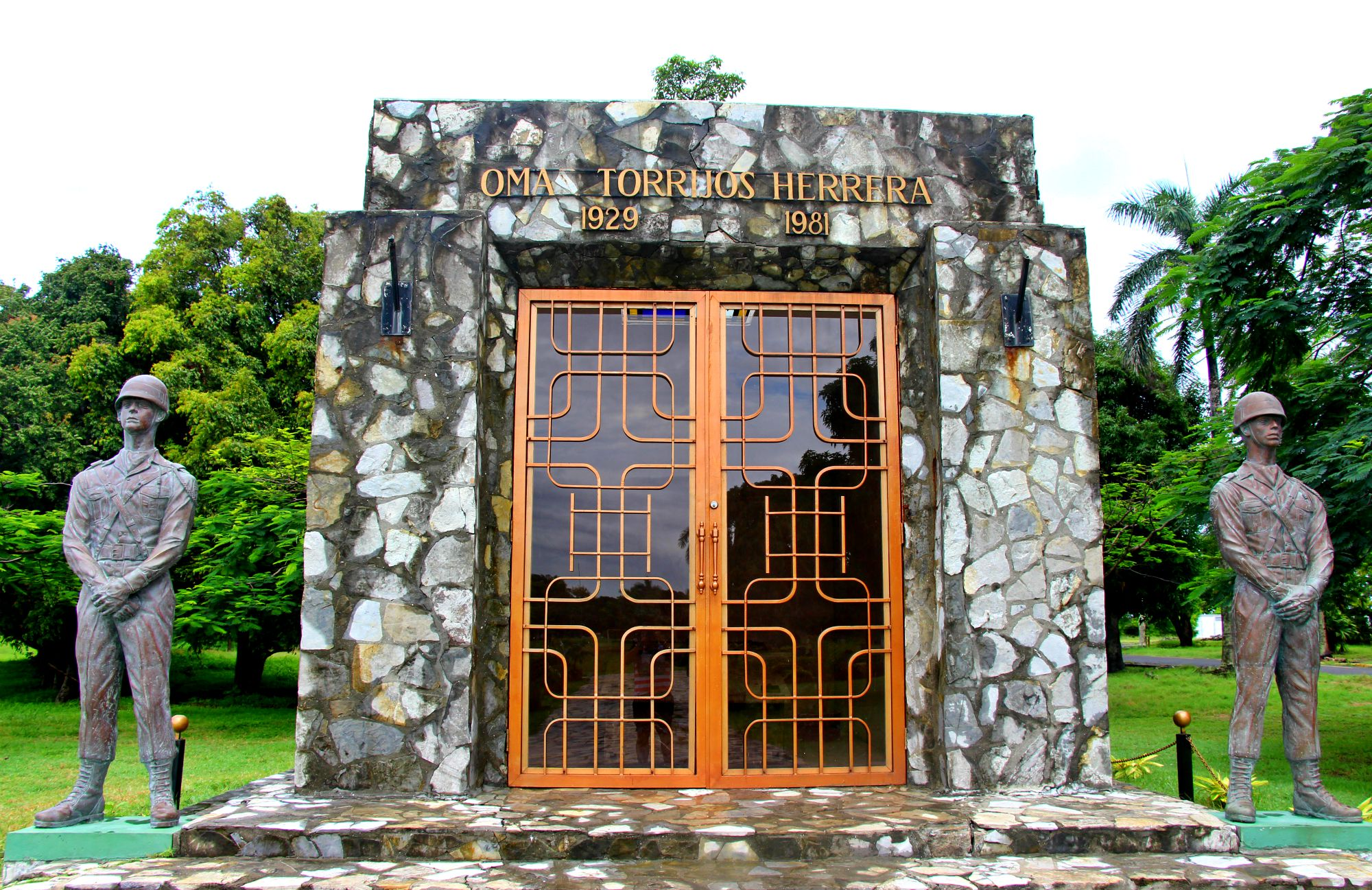 recinto homenajiado al difunto Omar Torrijos